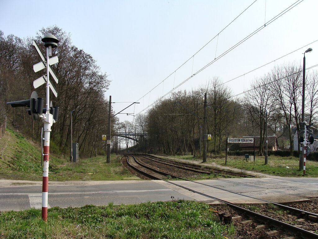 Nieczynny przystanek kolejowy Szczecin Golęcino.